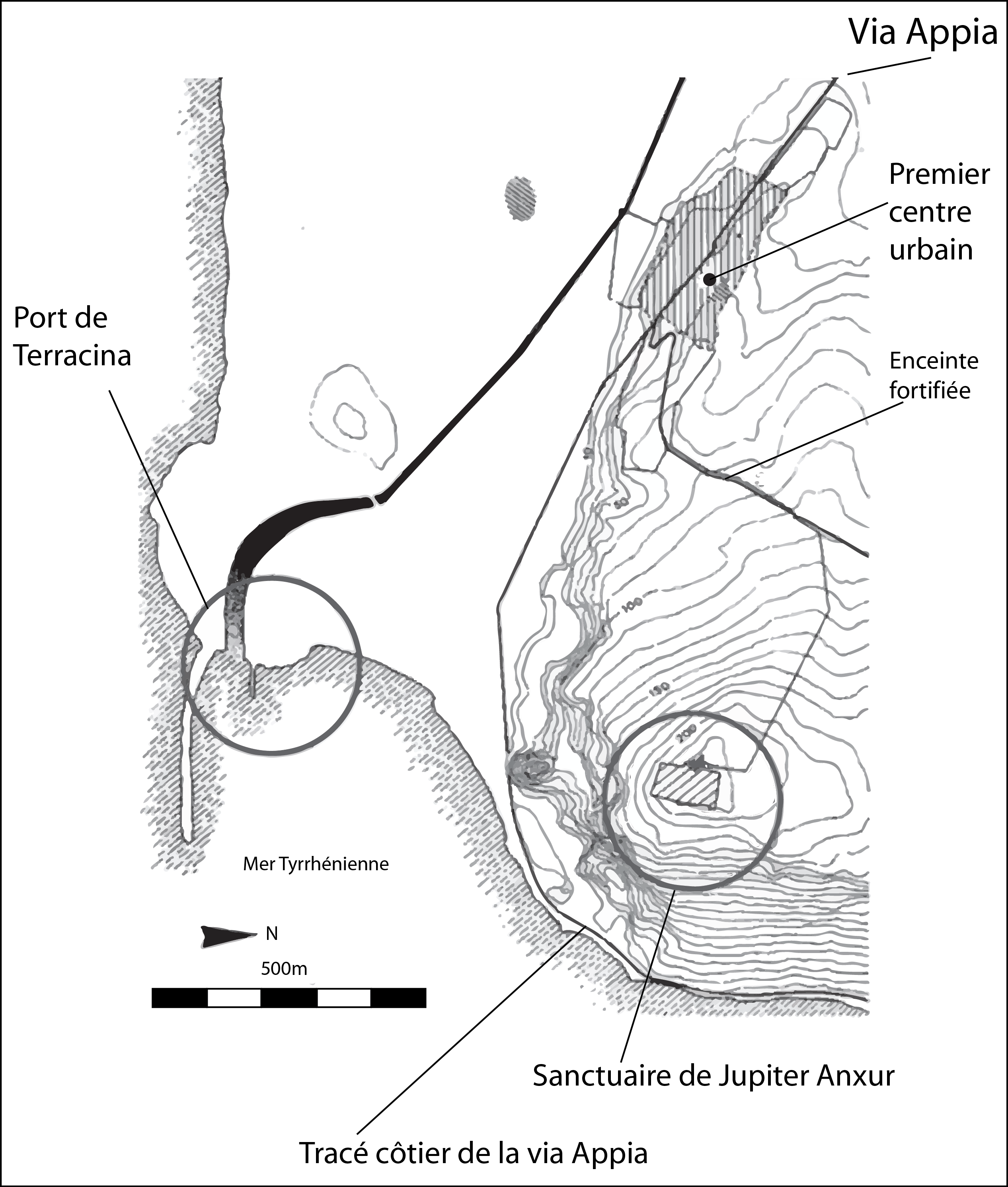 Situation du sanctuaire de Jupiter Anxur dans son environnement urbain et viaire